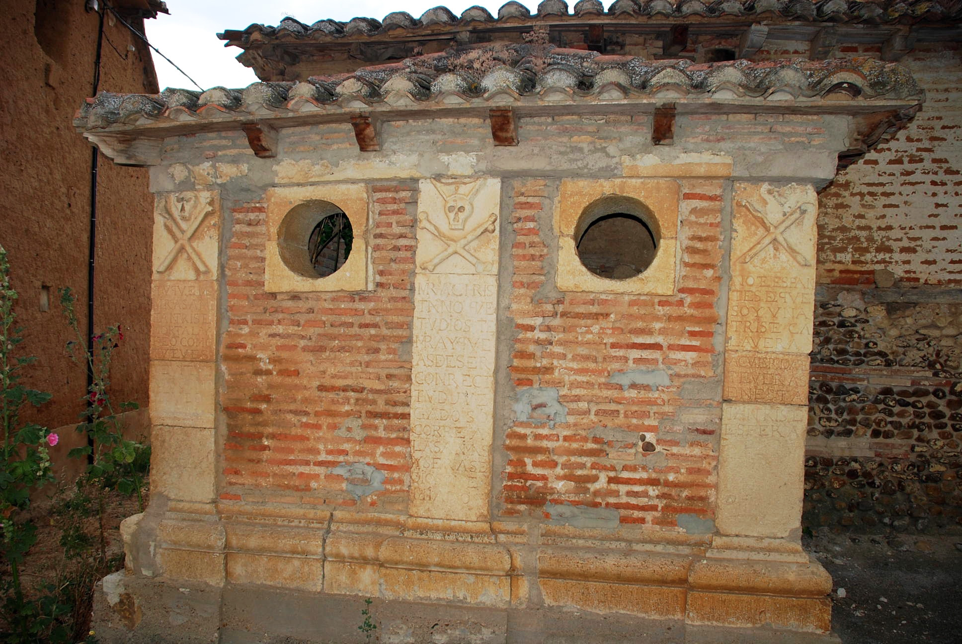 En el exterior de la parroquia de San Andrés Apóstol de Villavega de Castrillo (Palencia, Castilla-León). Compuesto de por una edificación de una sola estacia soportada por tres pilares profusamente decorados con calaveras e inscripciones alusivas a lo efímero de la vida. Estas columnas enmarcan dos vanos circulares que acceden al interior del osario. Empezando por la izquierda, las inscripciones dicen lo siguiente: TV QVE ME MIRAS A MI TAN TRISTE MORTAL Y FEO COMO TV TE VES ME VI TE VERAS COMO ME VEO MIRA CHRISTIANO QVE TV DIOS TE MIRA Y QVE AS DE SER CON RECTITVD JVZGADO SOCORRE A LAS ANIMAS Y SERAS DE DIOS PREMIADO NO TE ESPANTES DE QVE SOY VNA TRISTE CALAVERA ACVERDATE TE VERAS EN ESTA TAN TRISTE ESFERA